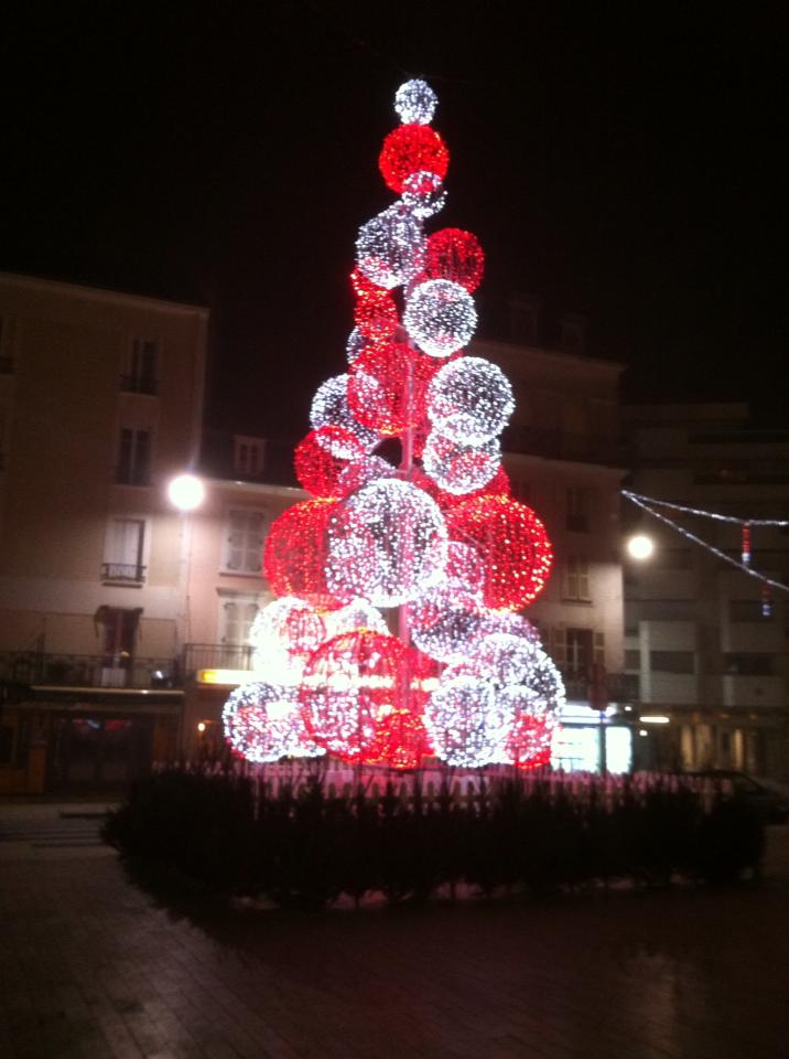 Une arbre lumineuse de Noël, devant le centre commercial Les Quatre Chemins au centre ville de Vichy en Hiver 2013.